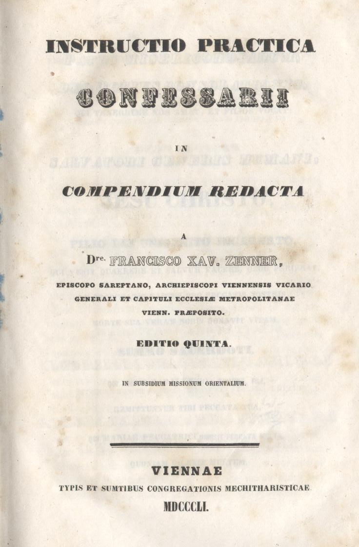 Franz Xaver Zenner, Weihbischof von Wien, Titelblatt seines Hauptwerkes